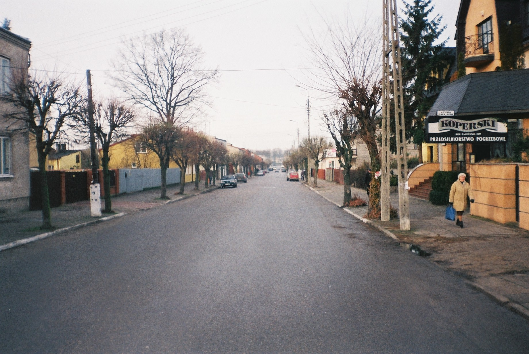 Sienkiewicza street in Mszczonów, Poland